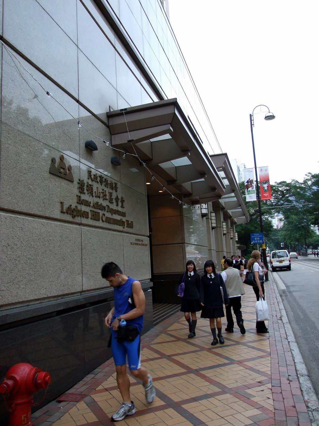 中文（香港）: 禮頓山社區會堂